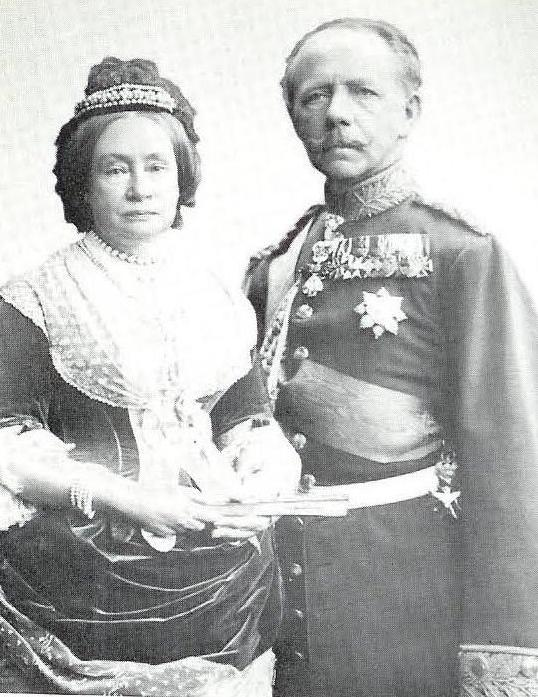 Foto van het groothertogelijk echtpaar Karl Alexander (overleden 1901) en zijn vrouw Sophie (overleden 1897), geboren prinses der Nederlanden.